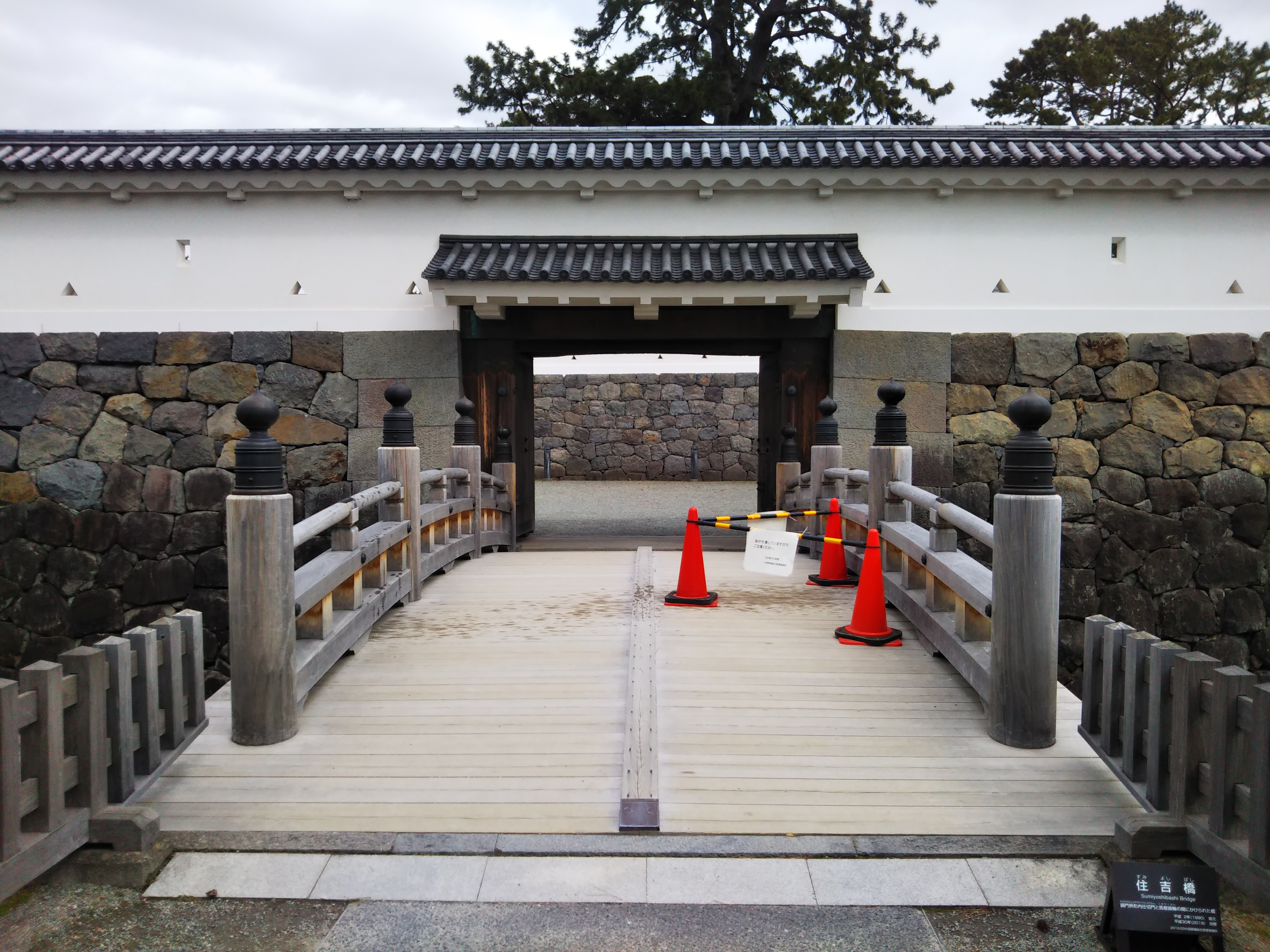 小田原城銅門に架かる住吉橋